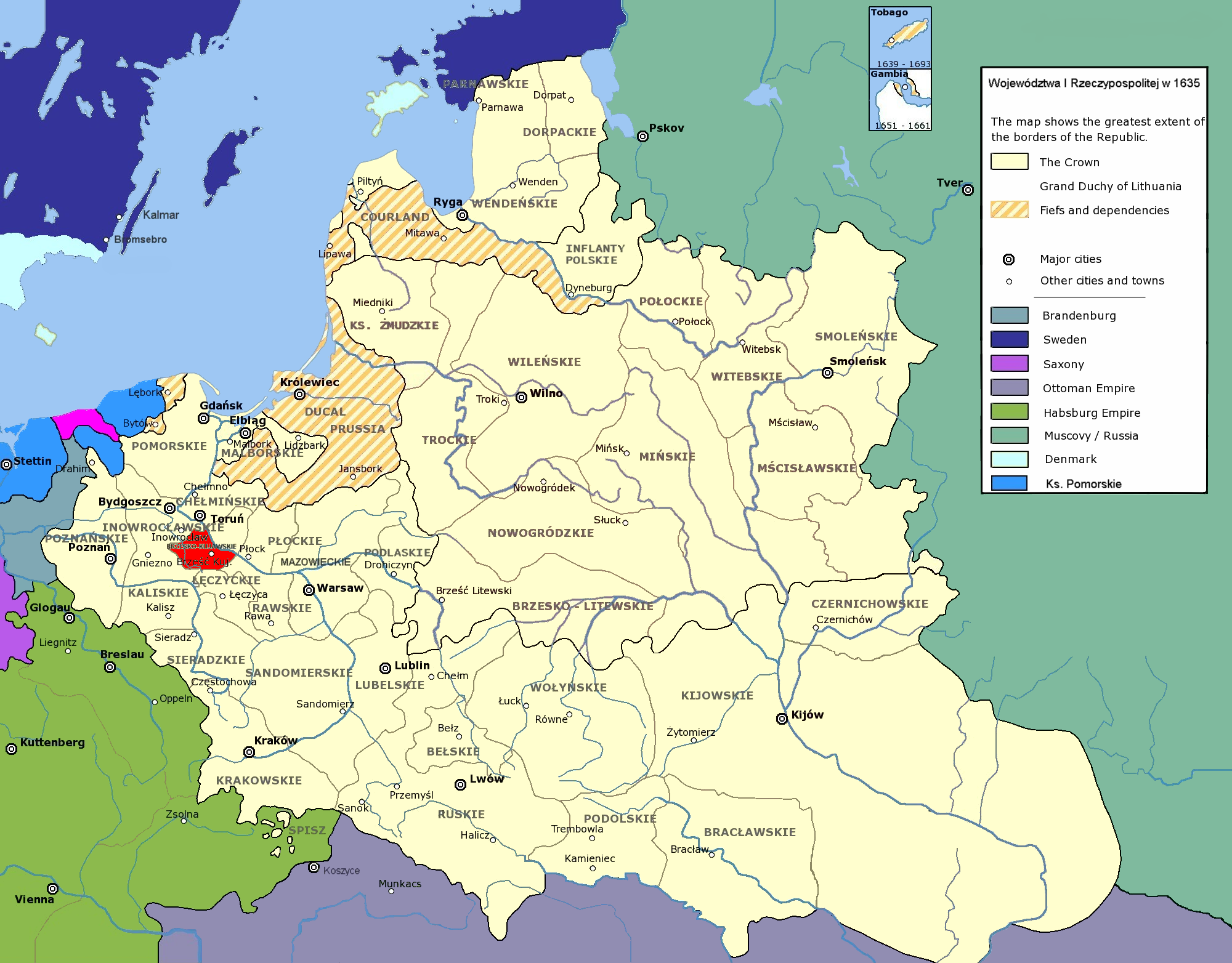 Rzeczpospolita Obojga Narodów w 1635 r.; województwo brzesko-kujawskie Polish-Lithuanian Commonwealth in 1635; Brześć Kujawski Voivodeship